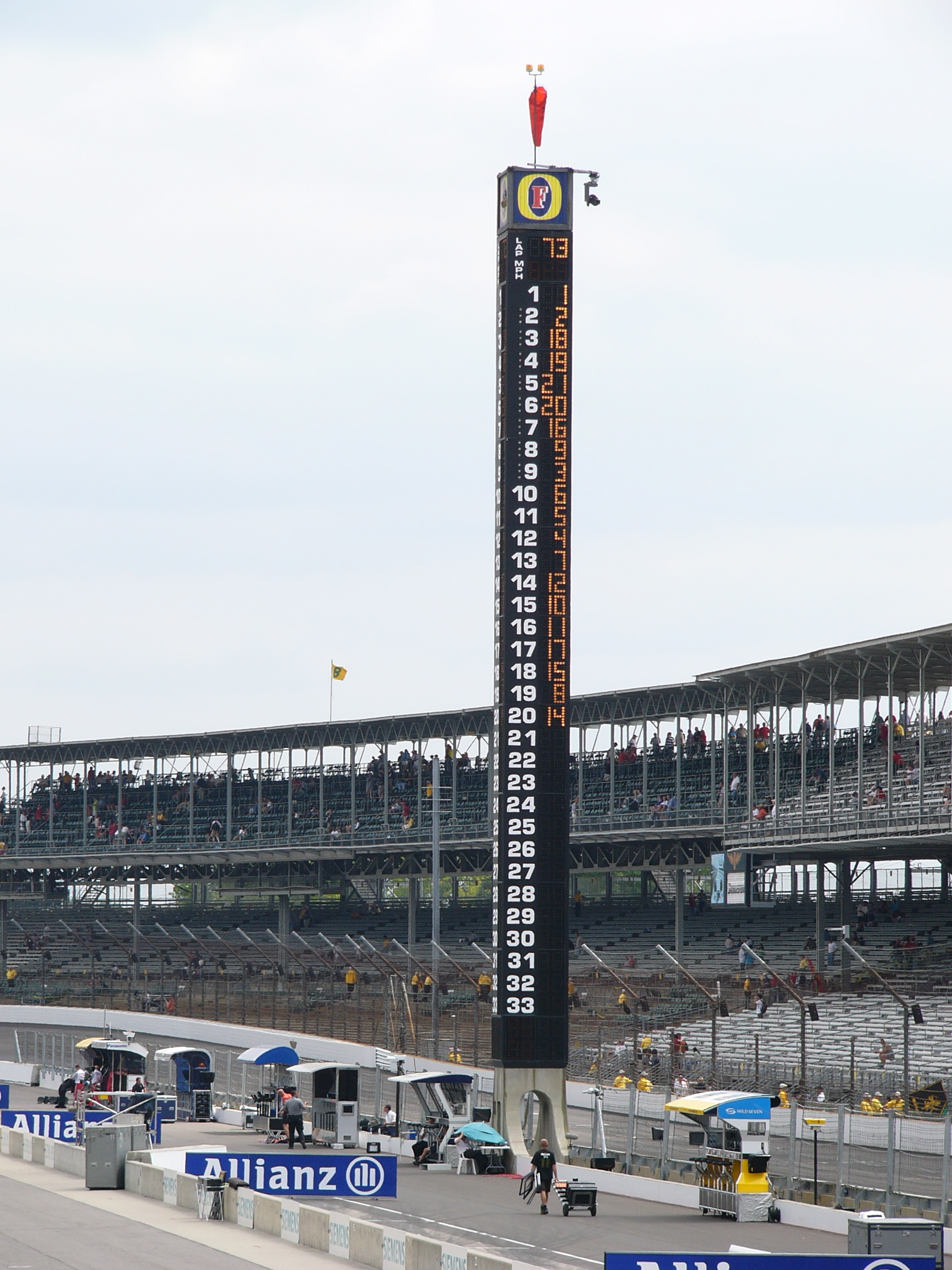 グランドスタンド正面、表彰台横に来ました